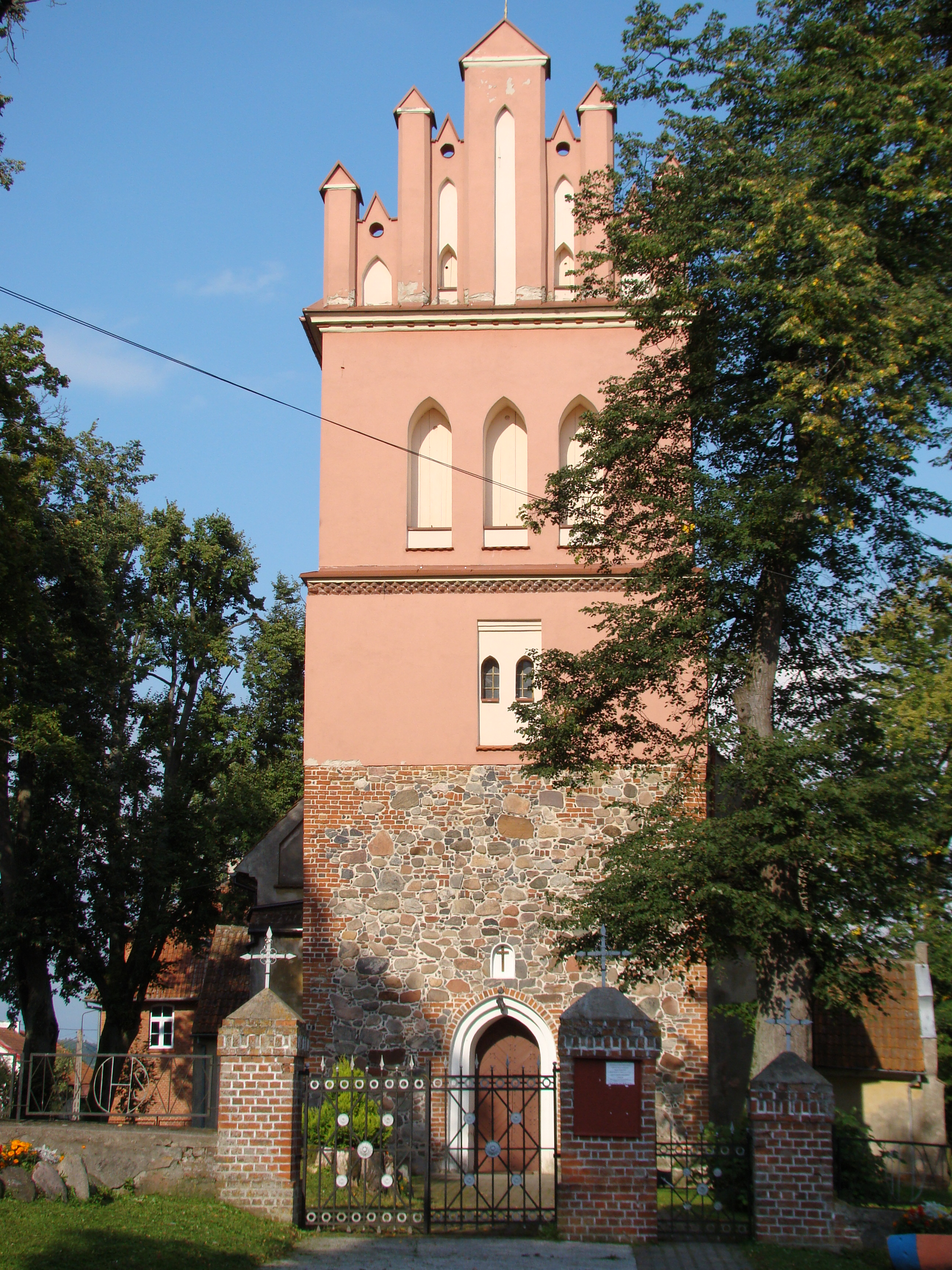 Runowo - kościół parafialny p.w. śś. Apostołów Szymona i Judy